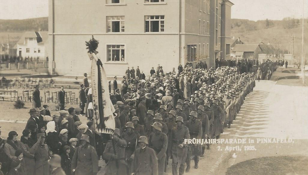 Frühjahrsparade der Garnison Pinkafeld am 7. April 1935